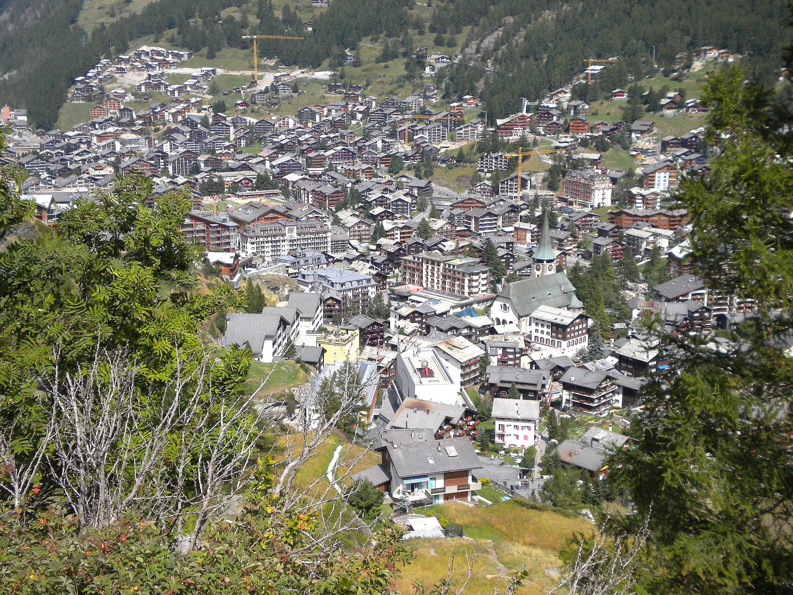 Vue sur le centre de Zermatt